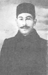 Gurban Pirimov (1880-1965)